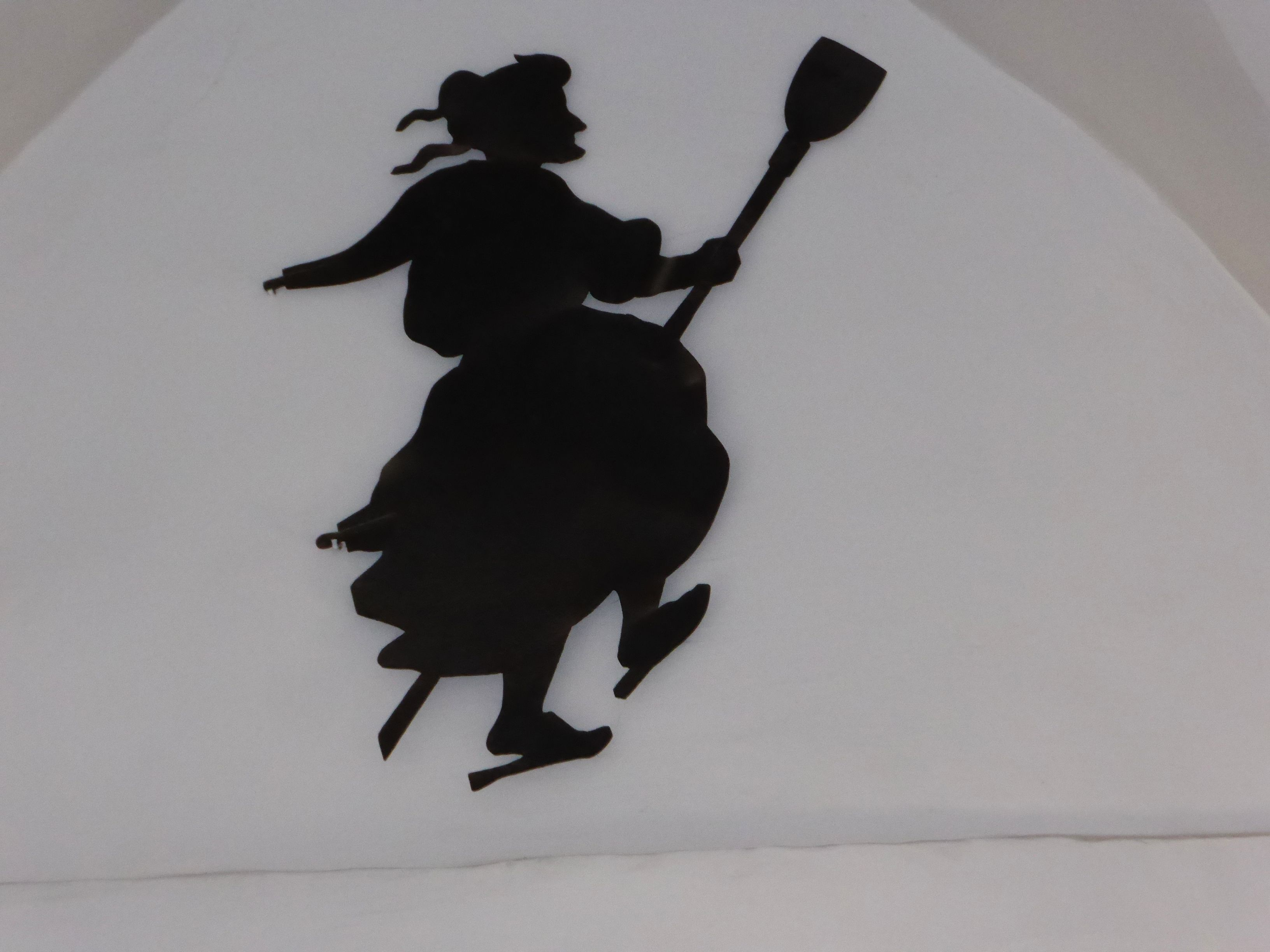 Hexenturm (Salzburg) Wetterfahre